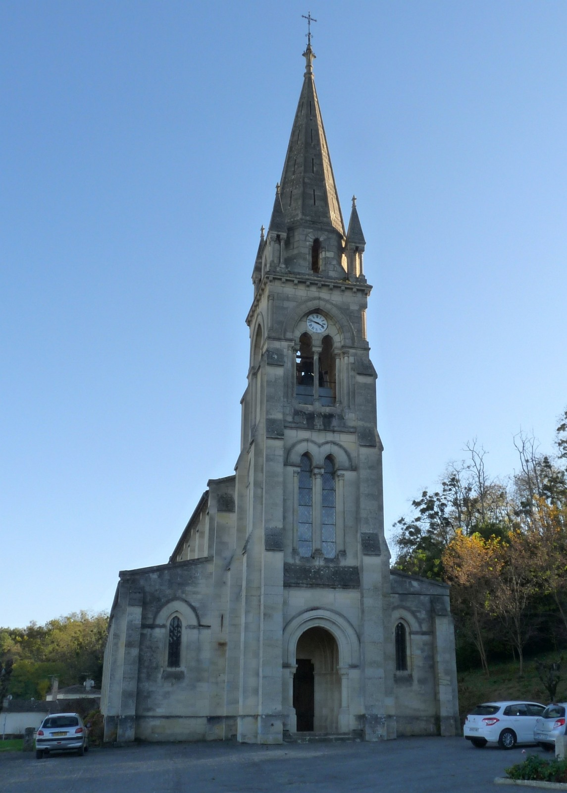 Eglise de Cabara, Gironde, France